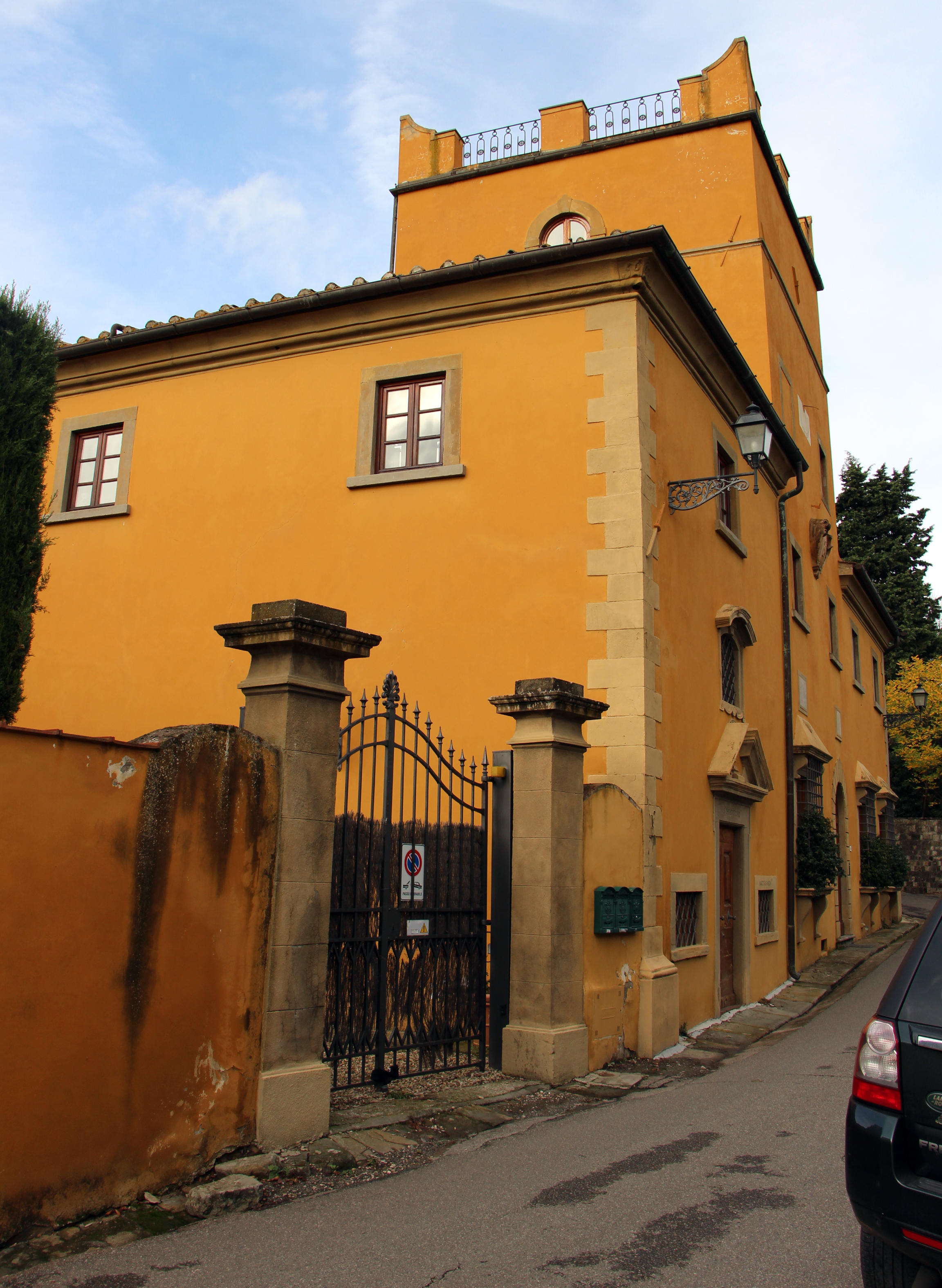 Canonica di Cercina